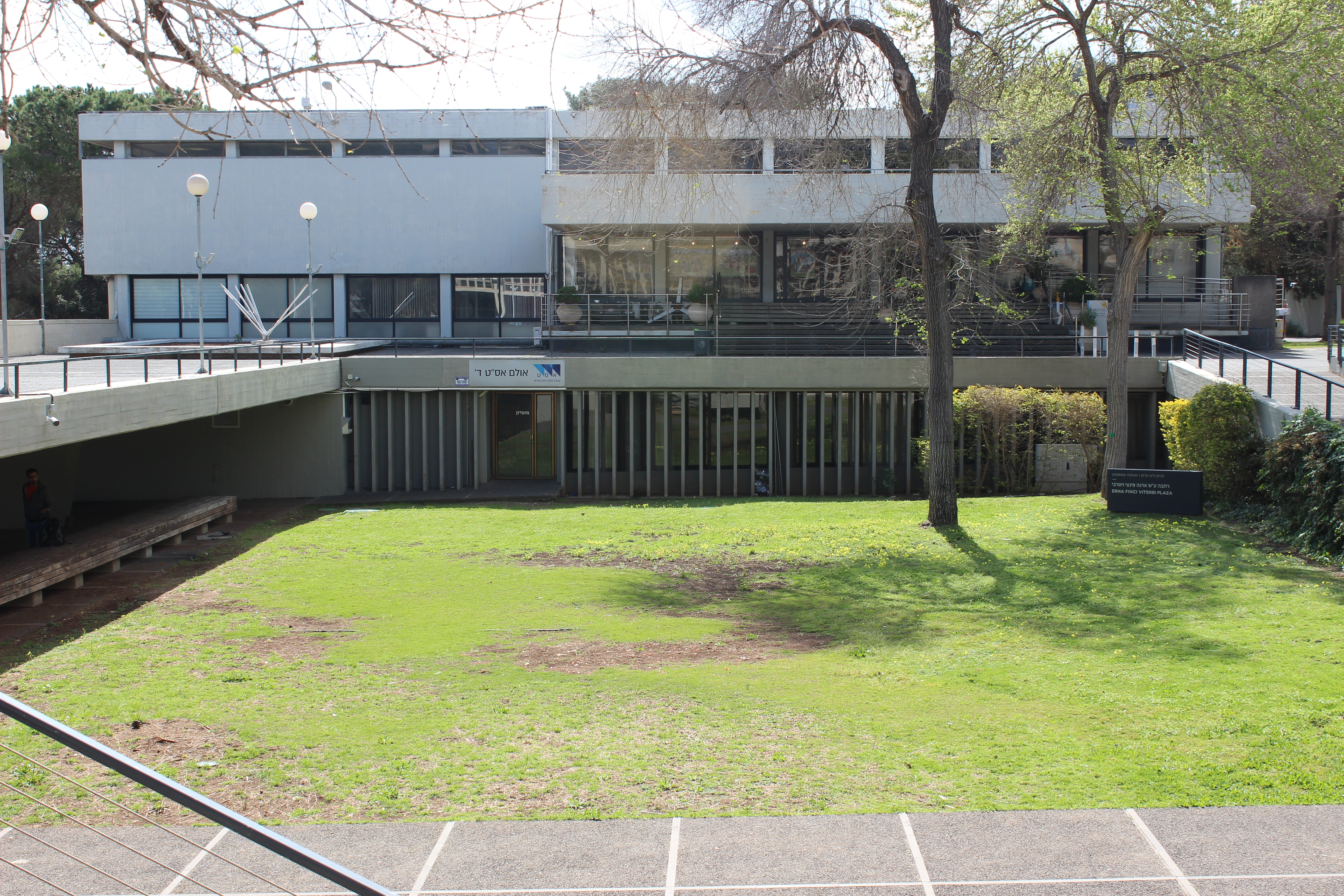 הספרייה המרכזית ע"ש אלישר